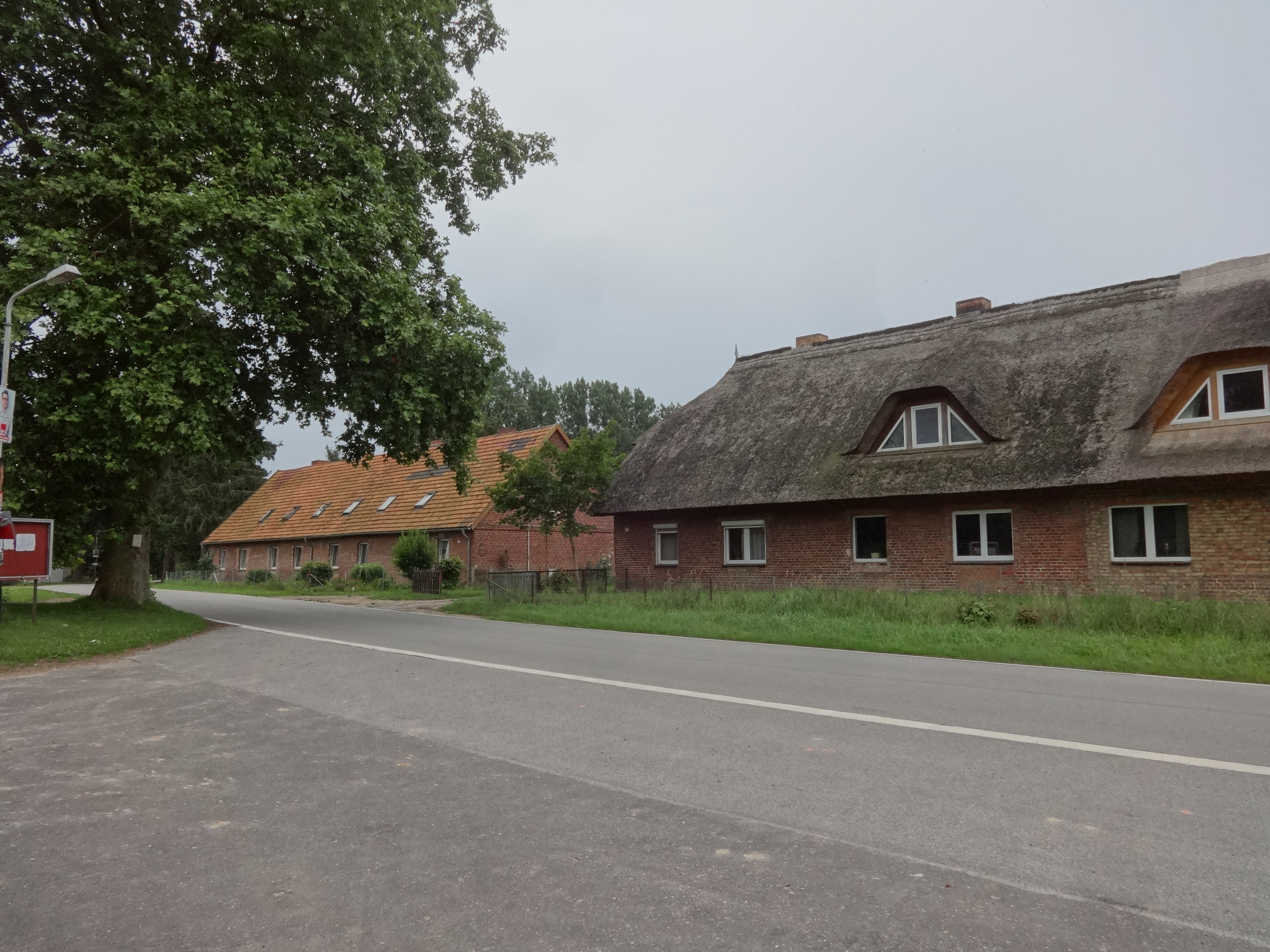 Dorfstraße in Rappenhagen, ein Ortsteil von Kemnitz (bei Greifswald)